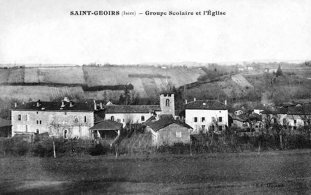 Saint-Geoirs (Isère) vue générale. La mairie et les écoles.